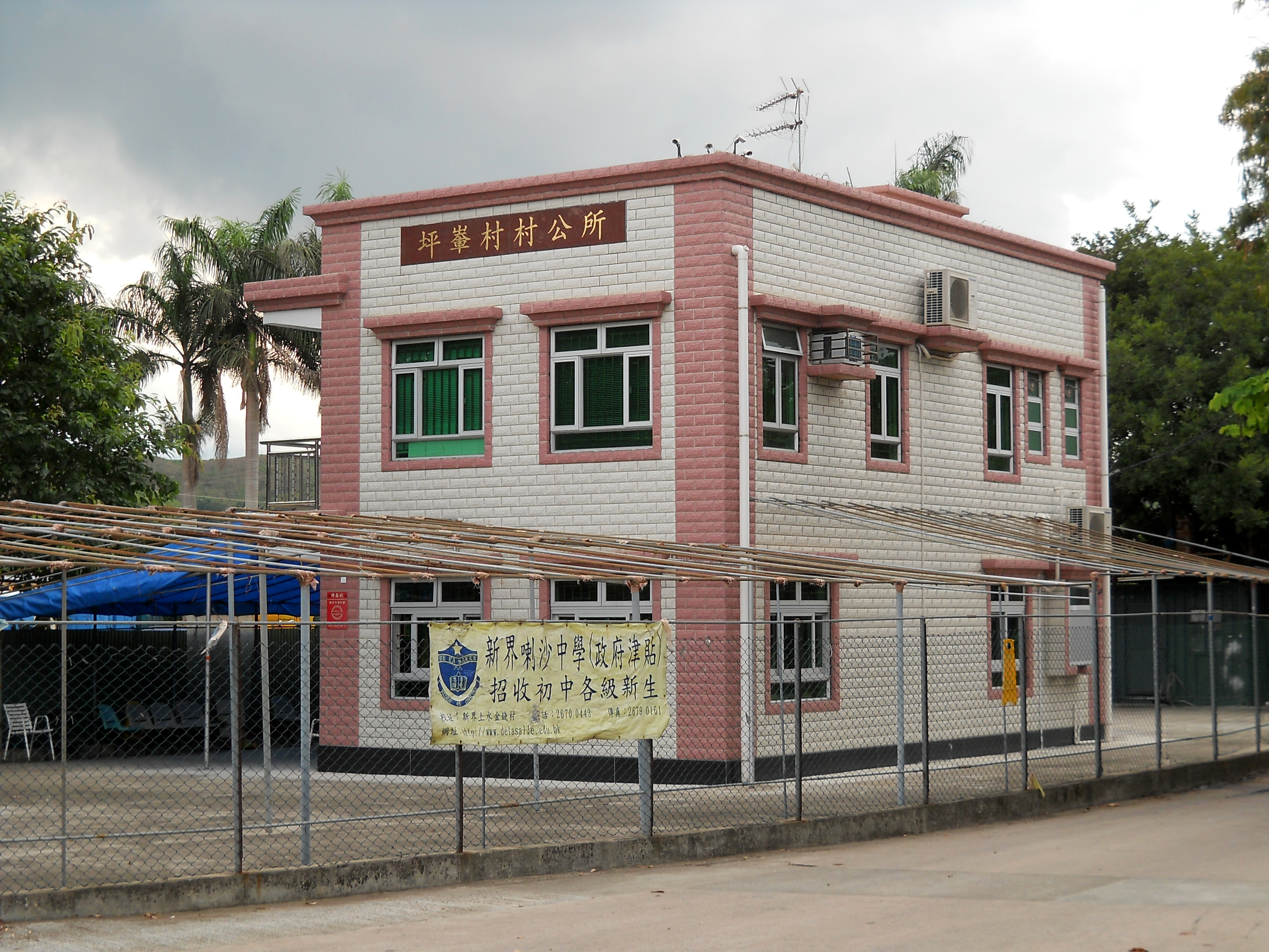 中文（香港）: 坪輋村村公所